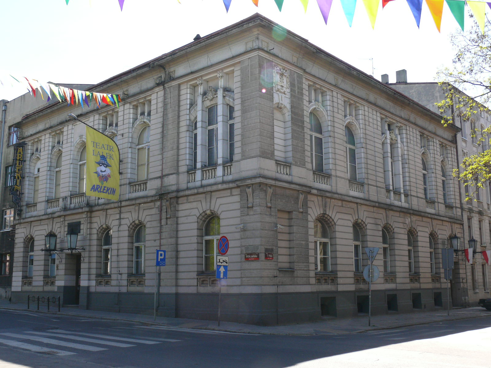 Teatr Lalek Arlekin (były dom redutowo-weselny), ul. Wólczańska 5 w Łodzi